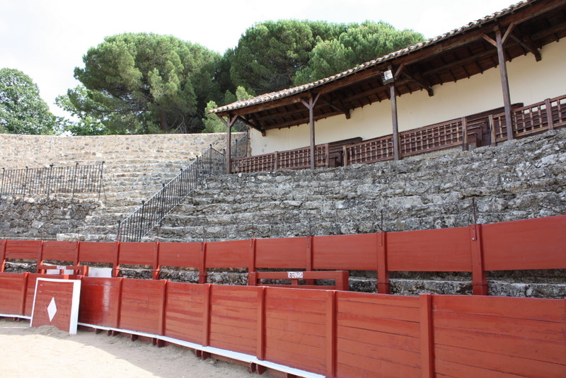 Plaza de toros de Béjar (Interior)